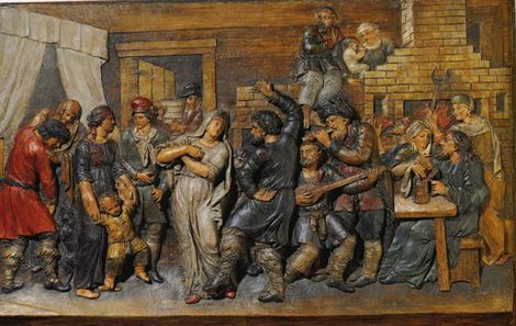 Неизвестный скульптор конца XVIII - начала XIX вв. Крестьянская свадьба. Пляска и угощение на свадьбе. Горельеф. Дерево, масло. 33,5х51 см Тверская областная картинная галерея.